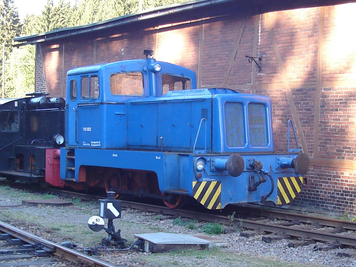 V 10 B, ehemalige Werklok in Schönheide Ost, heute beim Förderverein Historische Westsächsische Eisenbahnen in Schönheide Süd